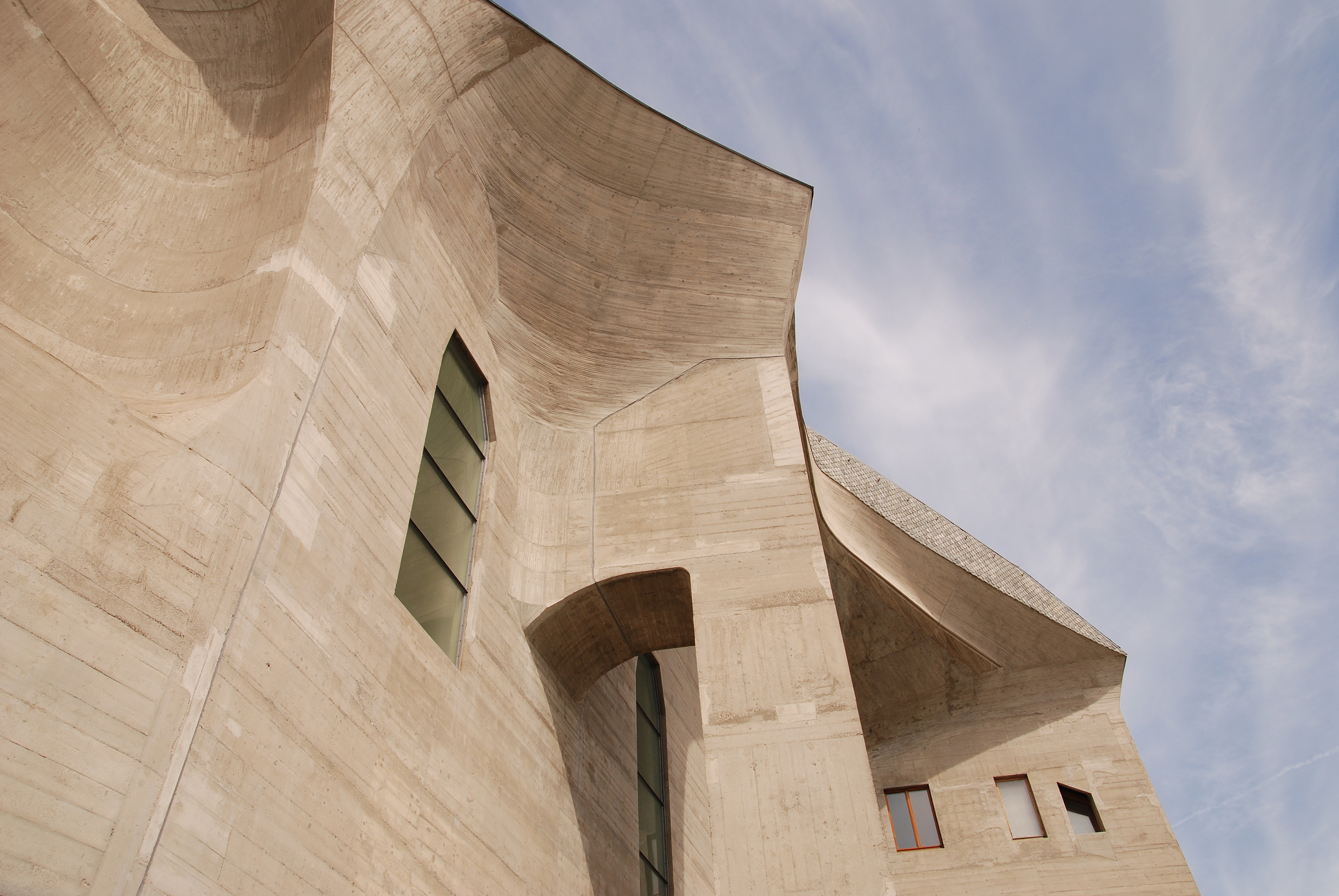 Detailansicht des Goetheanums